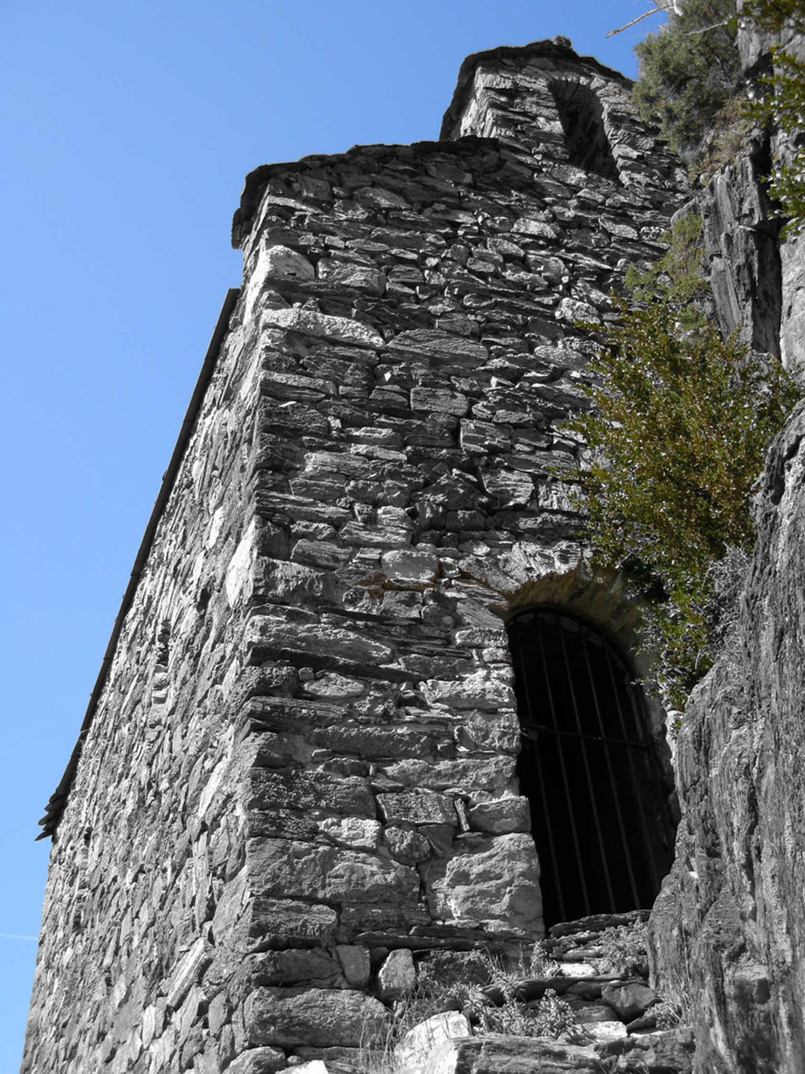 Petita ermita enganxada a la roca, de difícil accés